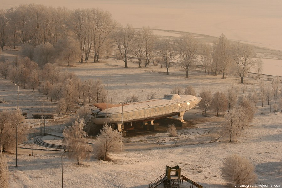 Спутник - судно на подводных крыльях. Ныне памятник в Тольятти